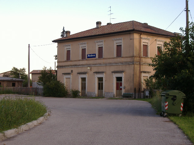 Stazione di Meduno